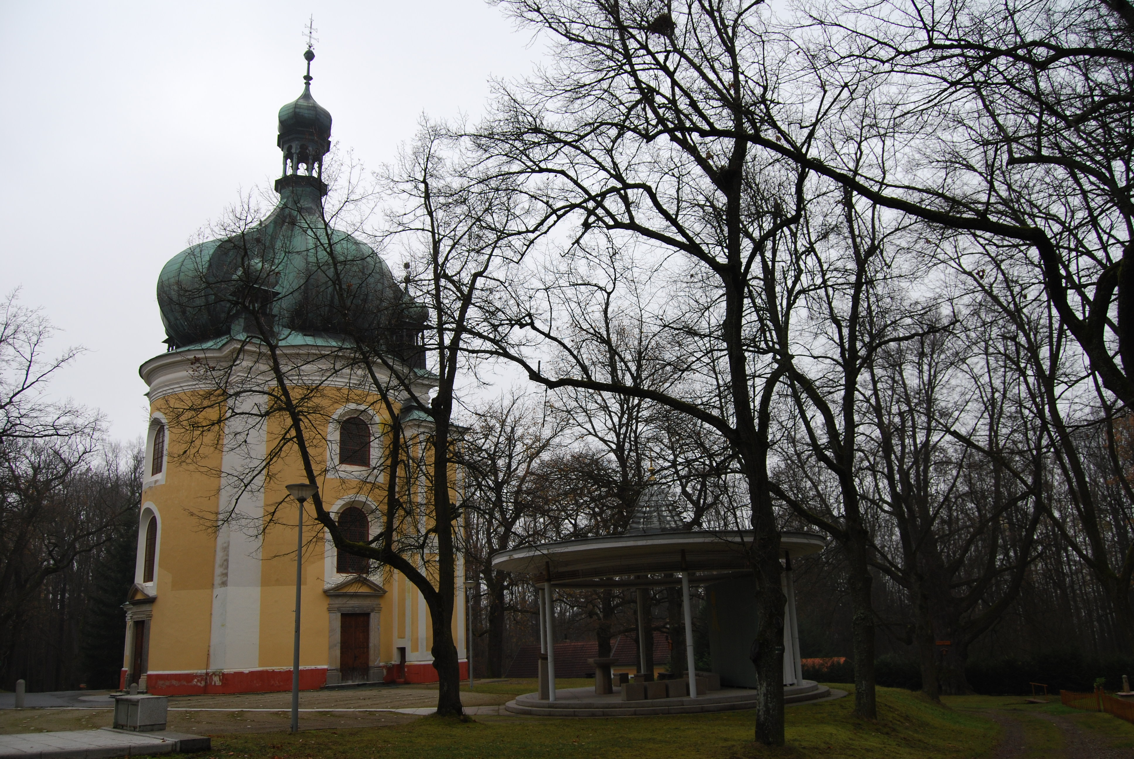 Kostel Jména Panny Marie. Lomec - poutní místo u Netolic, v katastru vesnice Nestanice v okrese Strakonice. Česká republika. - Google Maps - Google Earth